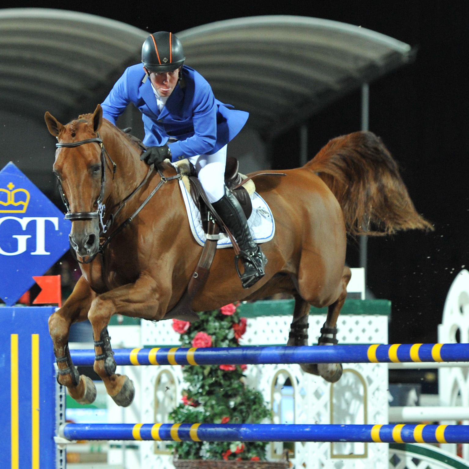 Vienna Masters am 21. September 2013 Longines Global Champions Tour Gerco Schröder (NED) auf London